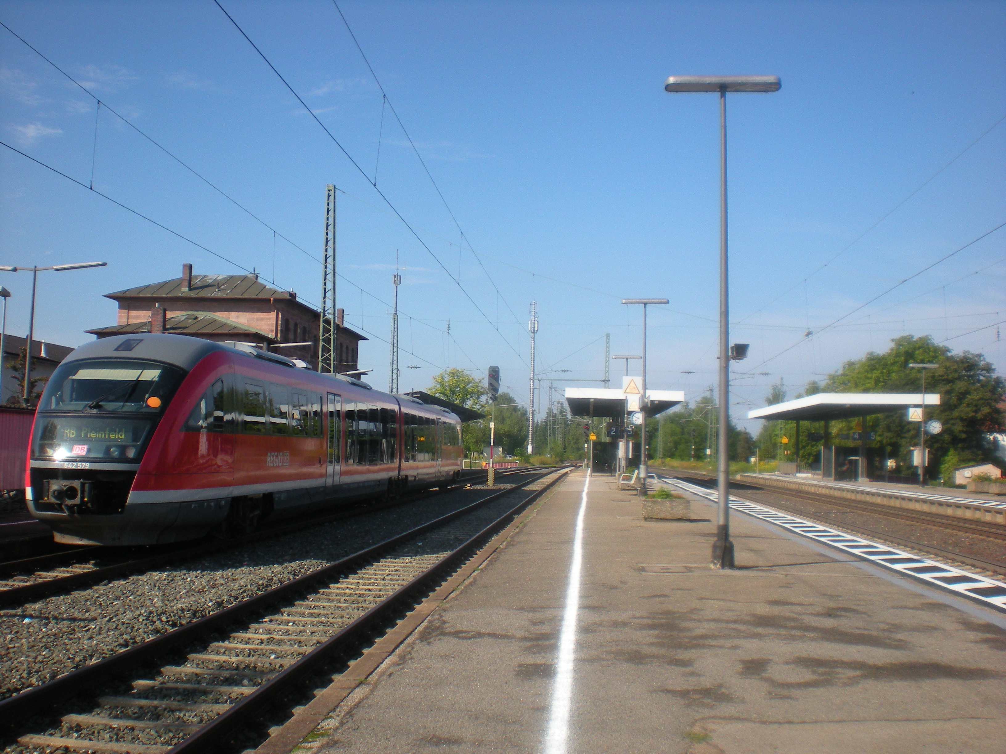 Bahnsteige des Bahnhofs Gunzenhausen mit Regionalbahn nach Pleinfeld